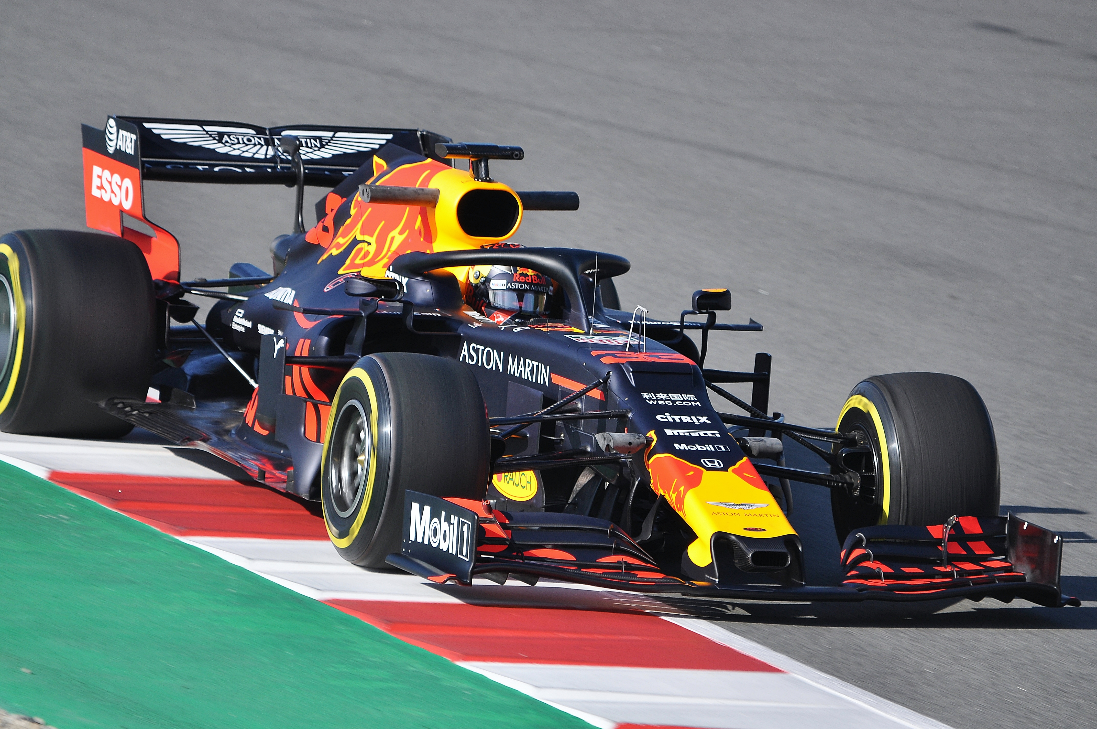 Test Days-Circuito de Catalunya